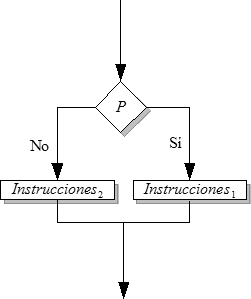 Diagrama de flujo que ejemplifica la instrucción condicional